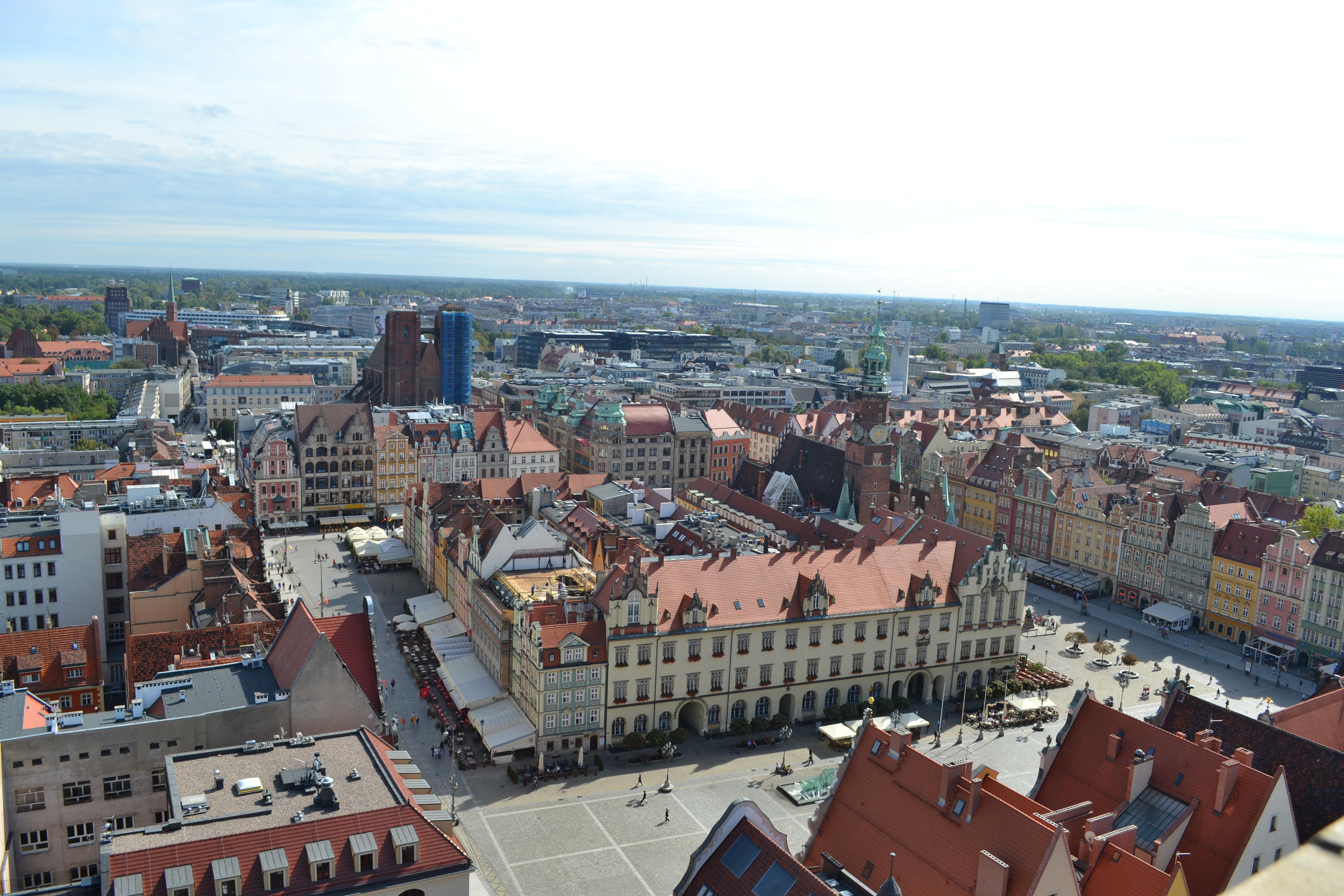 Rynek we Wrocławiu. Widok z wieży kościoła św. Elżbiety